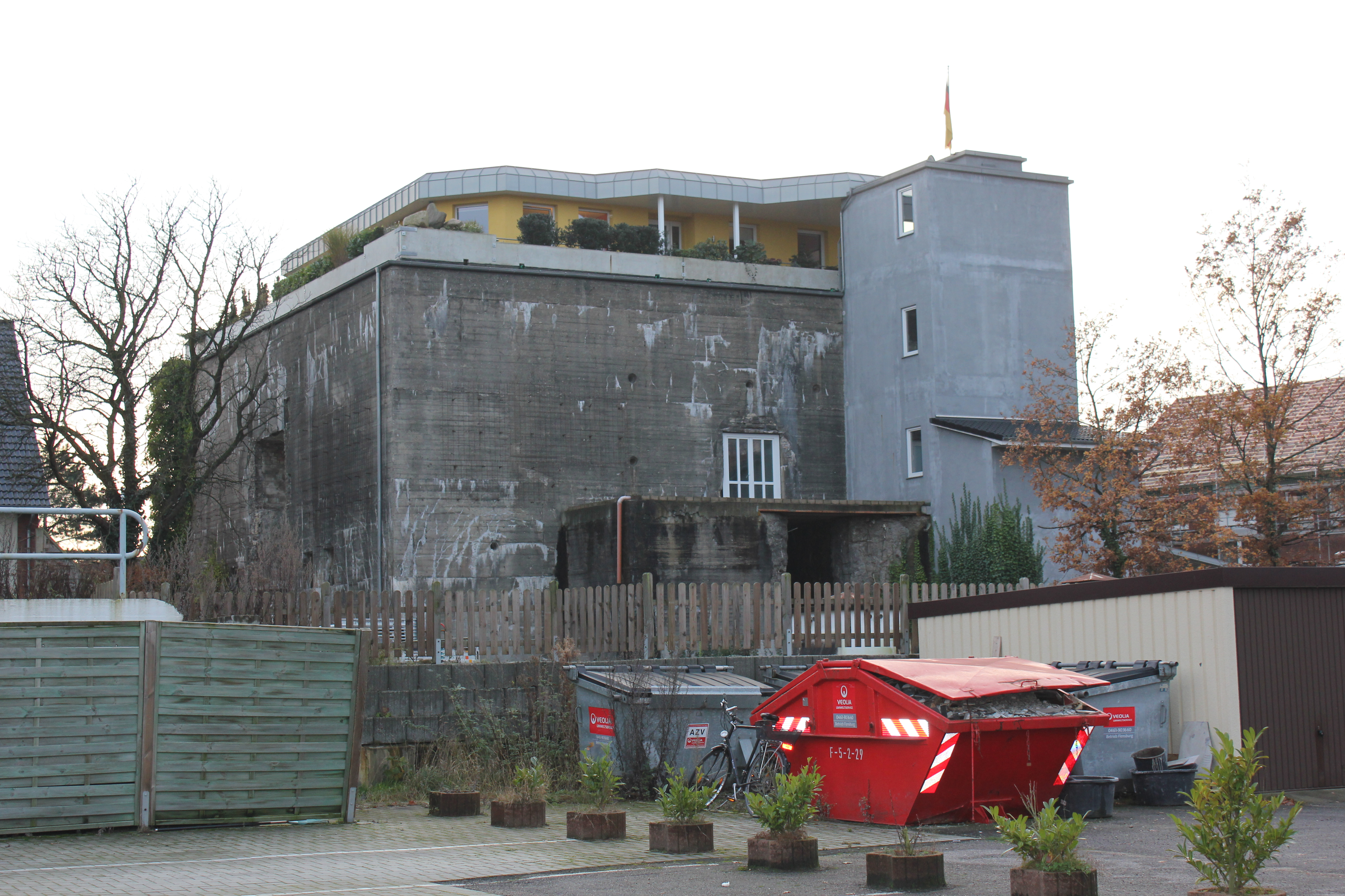 Mürwiker Truppenmannschaftsbunker (2013), Bild 06